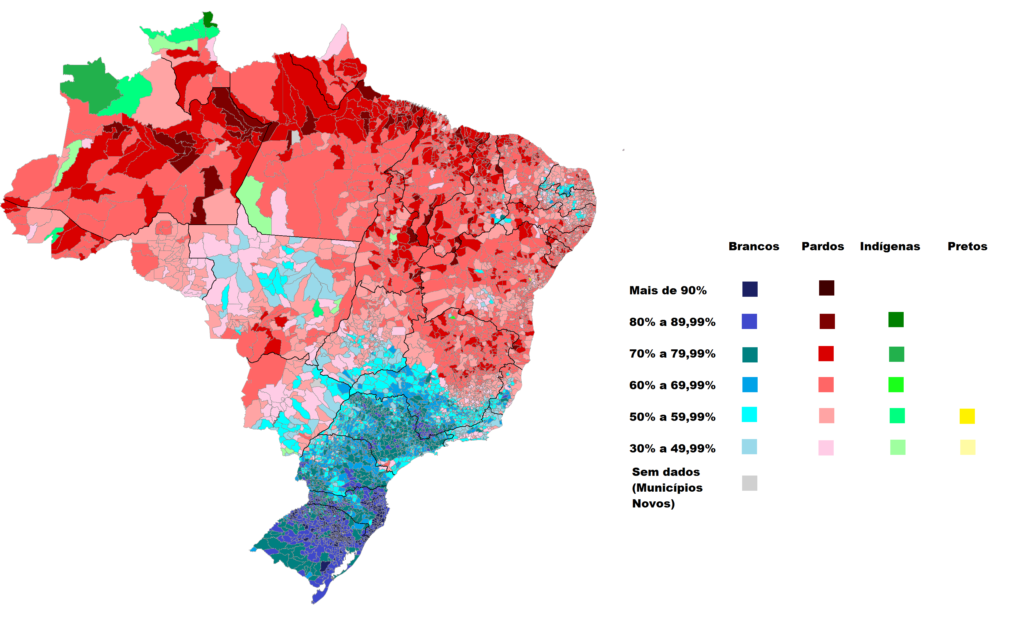 As cores estão de acordo com o grupo que apresenta o maior percentual na população, de qualquer município. Não representa necessariamente que o grupo étnico-racial representado pela cor seja majoritário, o que só vai acontecer quando determinado grupo étnico-racial abranger mais de 50% de alguma população. Alguns municípios chegam a ter apenas alguns décimos de diferença nos percentuais de cada grupo. Este mapa foi elaborado com dados do do IBGE do censo 2010, que podem ser encontradas no link